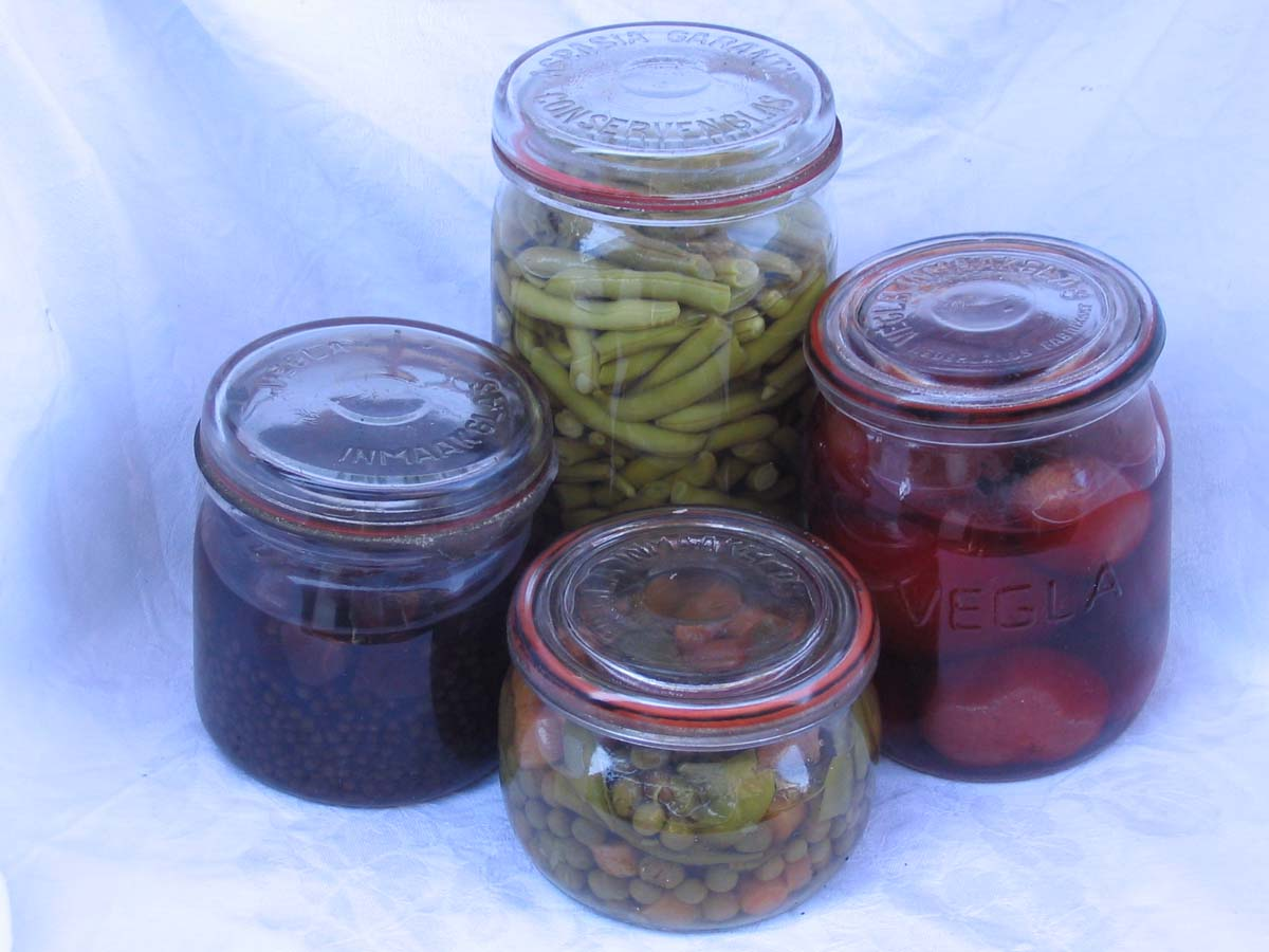 Weckpotten. Eigengemaakte foto van gevulde weckpotten die al meer dan 40 jaar bij mijn moeder in de kelder staan.